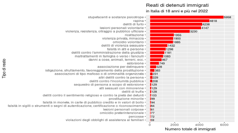 Grafico realizzato con dati Istat tramite il programma RStudio